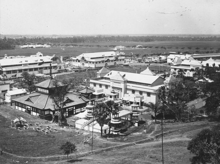 Foto. Gezicht over de paviljoens op het terrein van de Koloniale Tentoonstelling in Semarang